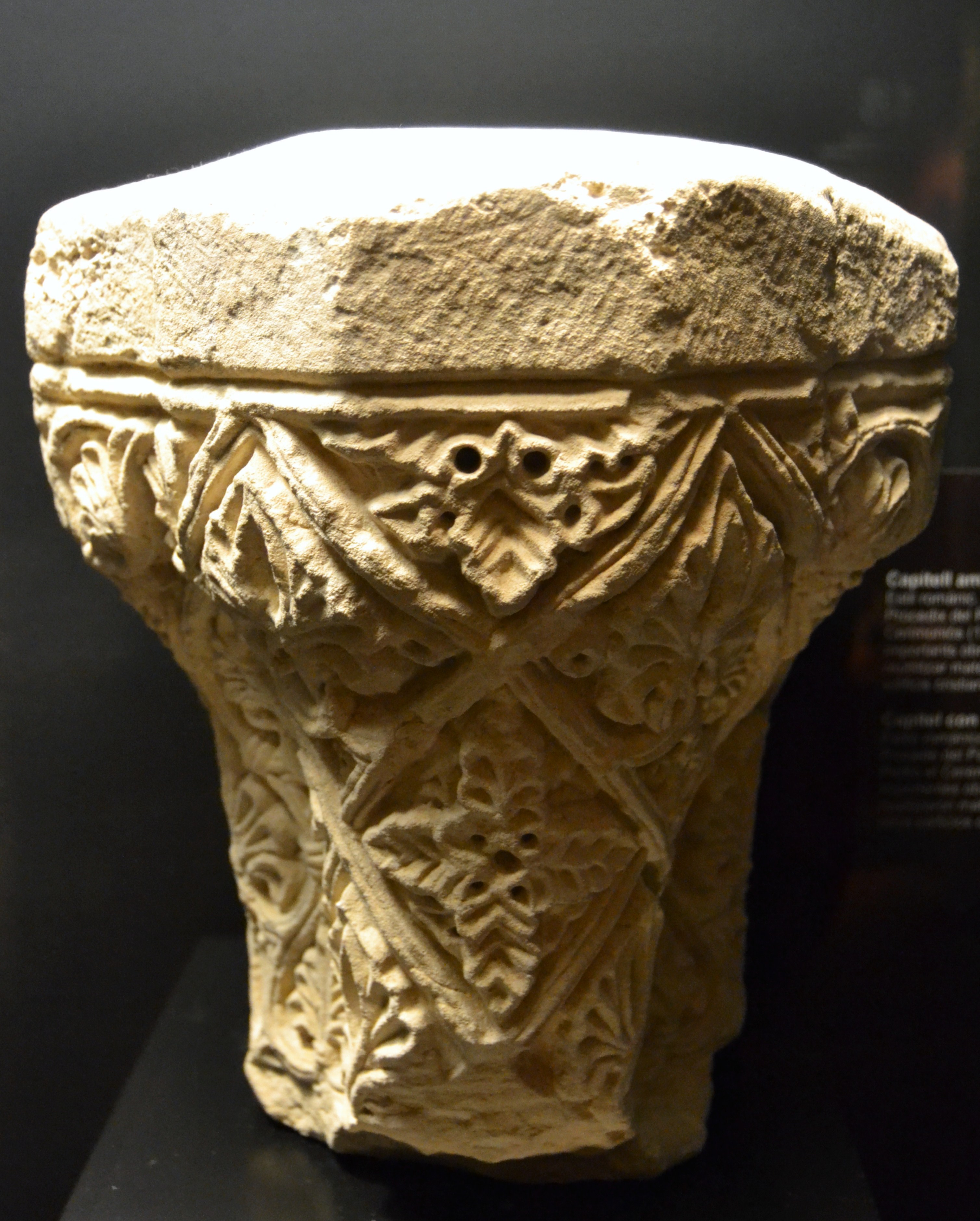 Capitell romànic amb decoració vegetal procedent del palau del real de València, Museu d'Història de València.